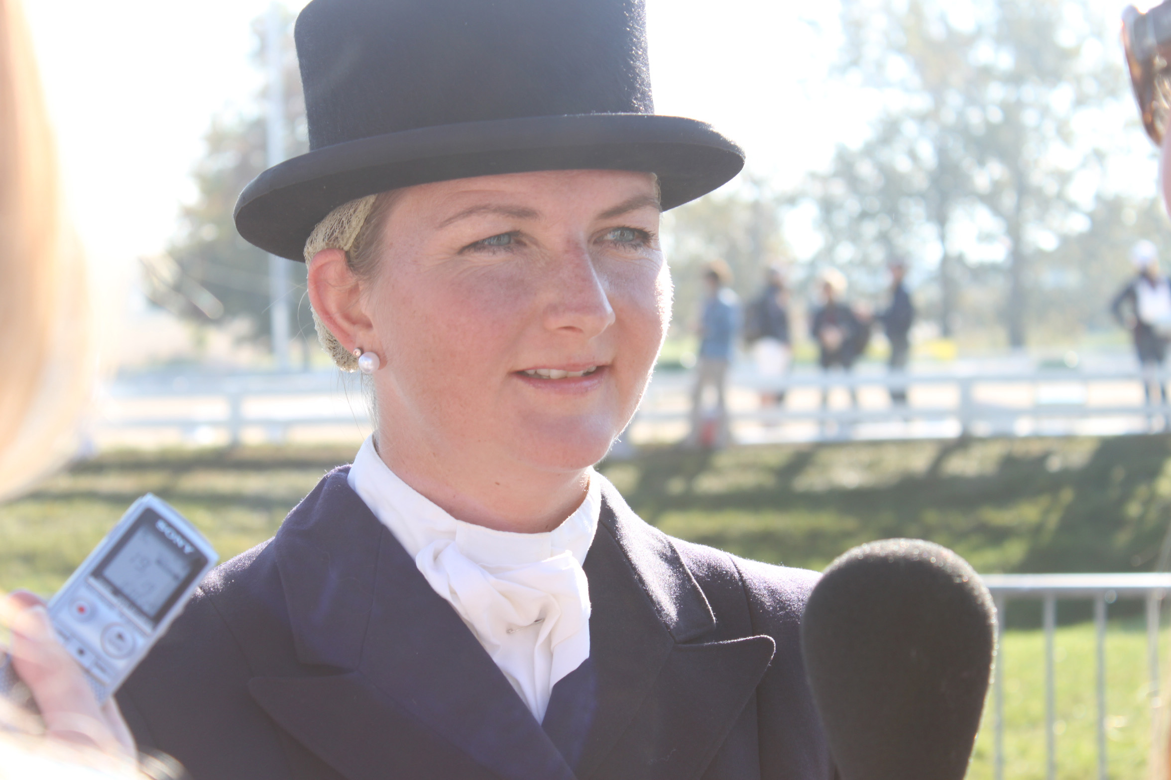 Fälttävlansryttaren Linda Algotsson.